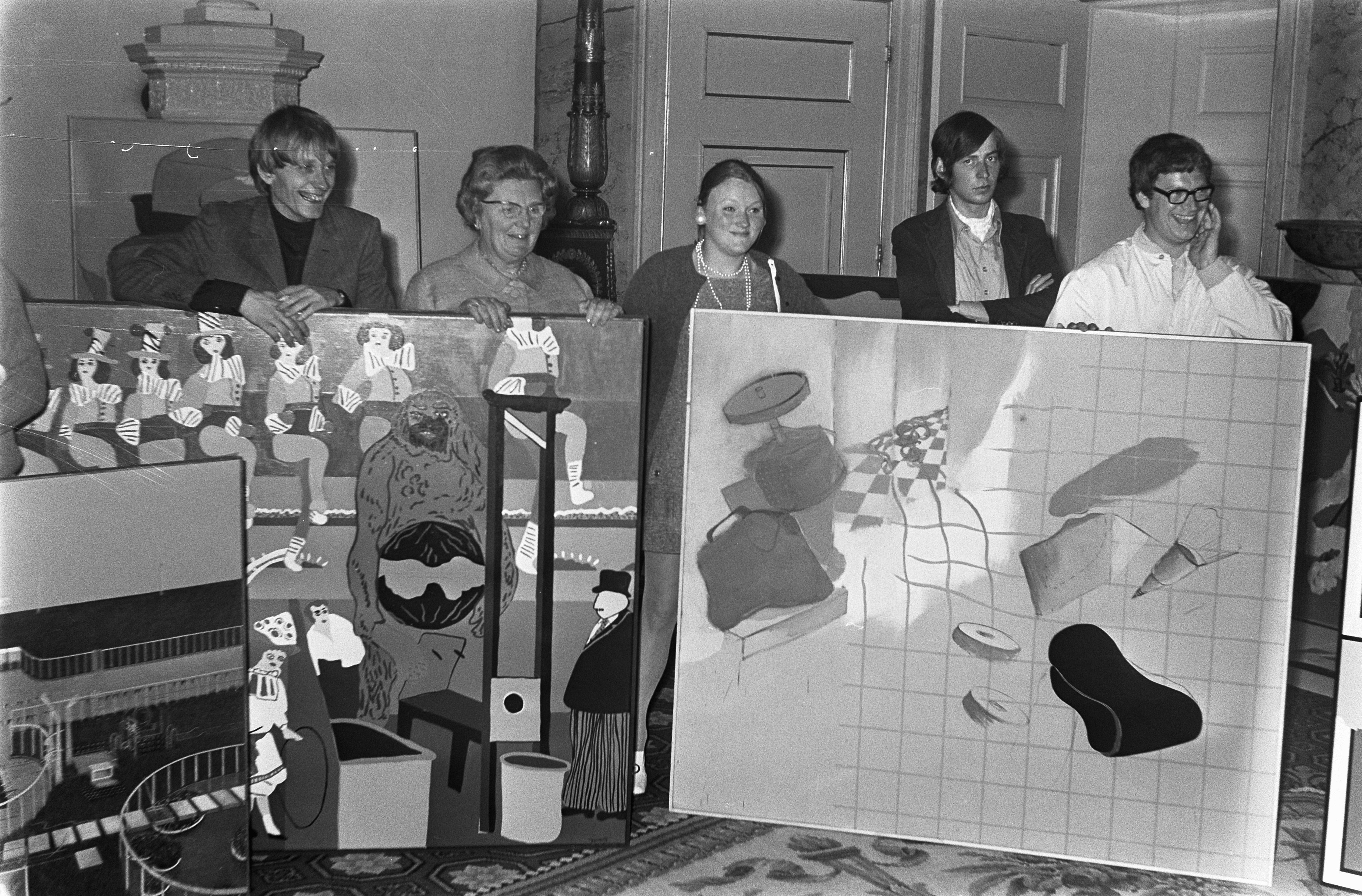 Collectie / Archief : Fotocollectie Anefo Reportage / Serie : Ontvangst op Paleis Soestdijk Beschrijving : koningin Juliana ontvangt de Koninklijke Vereniging voor Subsidie aan de Vrije Schilderkunst en een aantal kunstschilders op Paleis Soestdijk, v.l.n.r. J. Zekveld, koningin Juliana, M. Geys, R. v.d. Wint en W. Moerenhout Datum : 27 juni 1969 Locatie : Baarn, Utrecht (prov.) Trefwoorden : koninginnen, kunstschilders, paleizen, prijzen, subsidies Persoonsnaam : Geys, M., Juliana (koningin Nederland), Moerenhout, W., Wint, R.V.d. Instellingsnaam : Zekveld, J. Fotograaf : Fotograaf Onbekend / Anefo Auteursrechthebbende : Nationaal Archief Materiaalsoort : Negatief (zwart/wit) Nummer archiefinventaris : bekijk toegang 2.24.01.05 Bestanddeelnummer : 922-5766